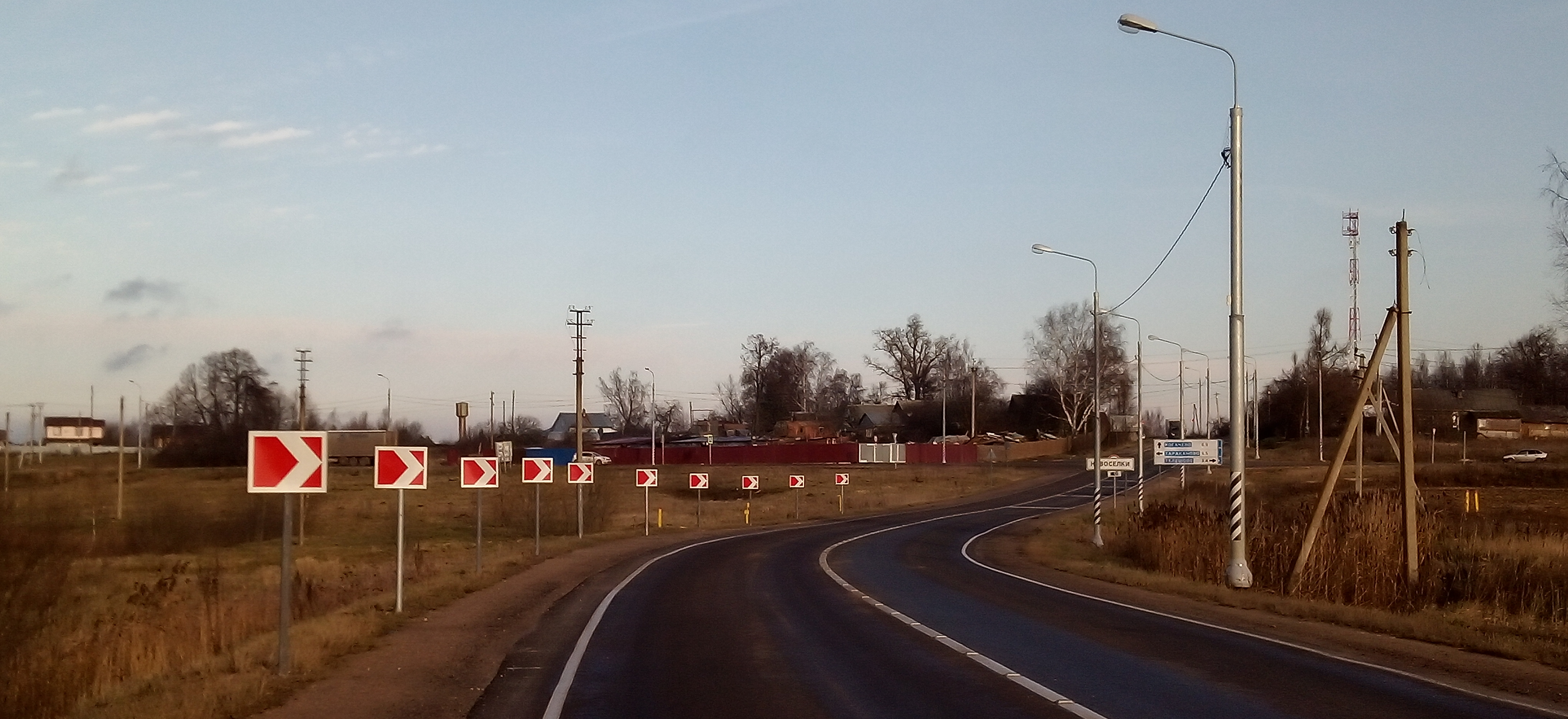 Новосёлки со стороны Москвы.